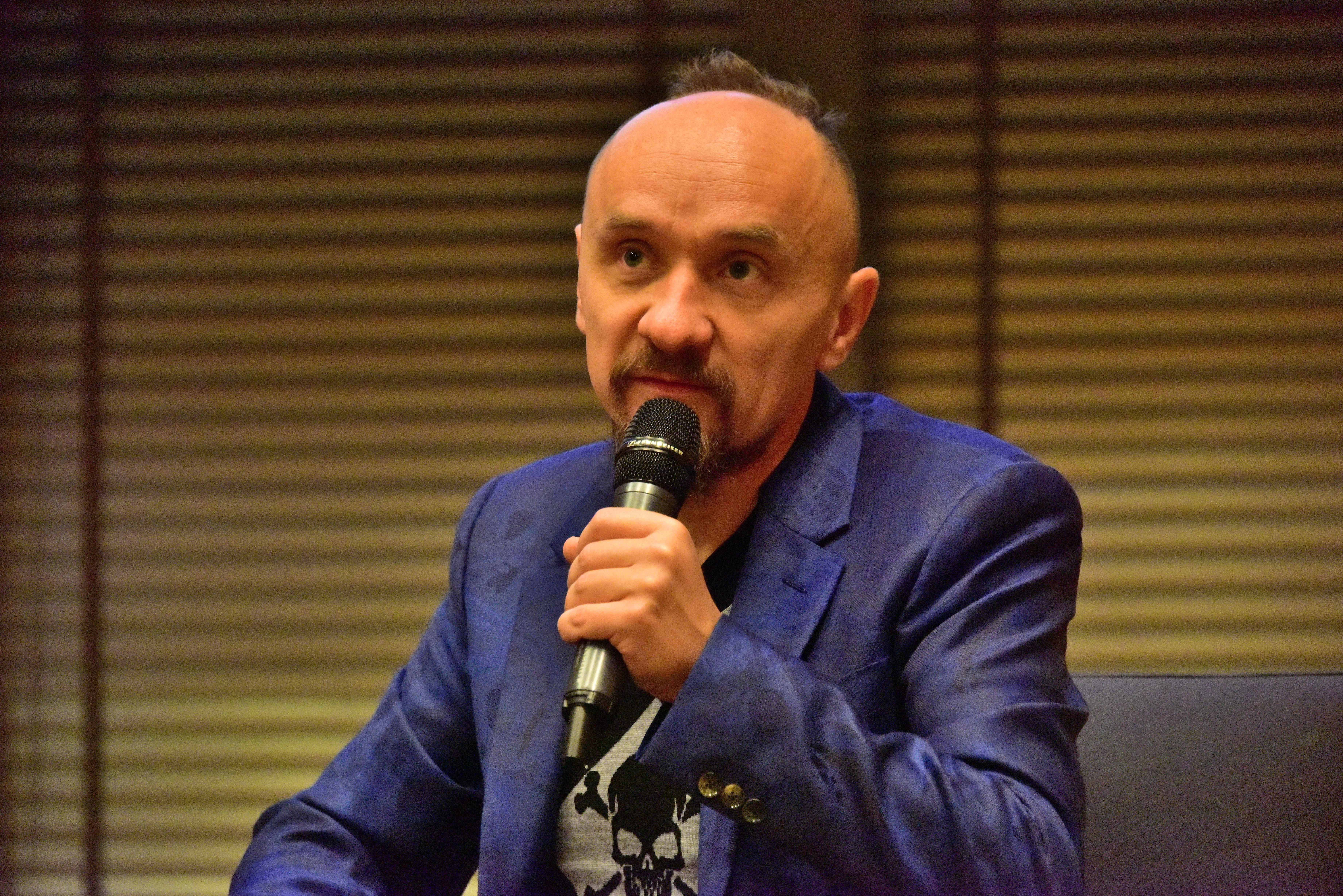 Jan Klata, reżyser teatralny